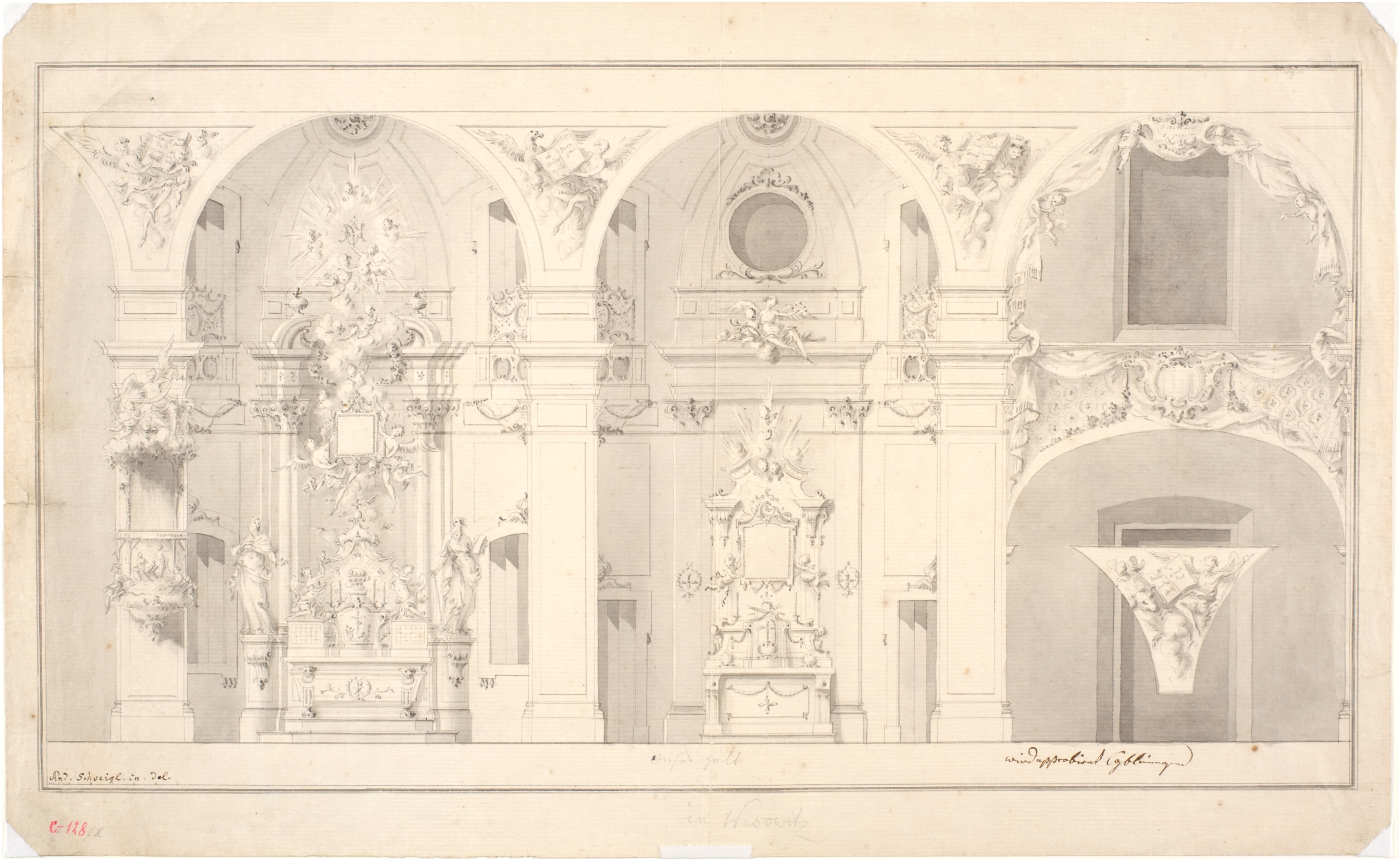 Návrh interiéru zámecké kaple ve Vizovicích (před 1774) - Ondřej Schweigl